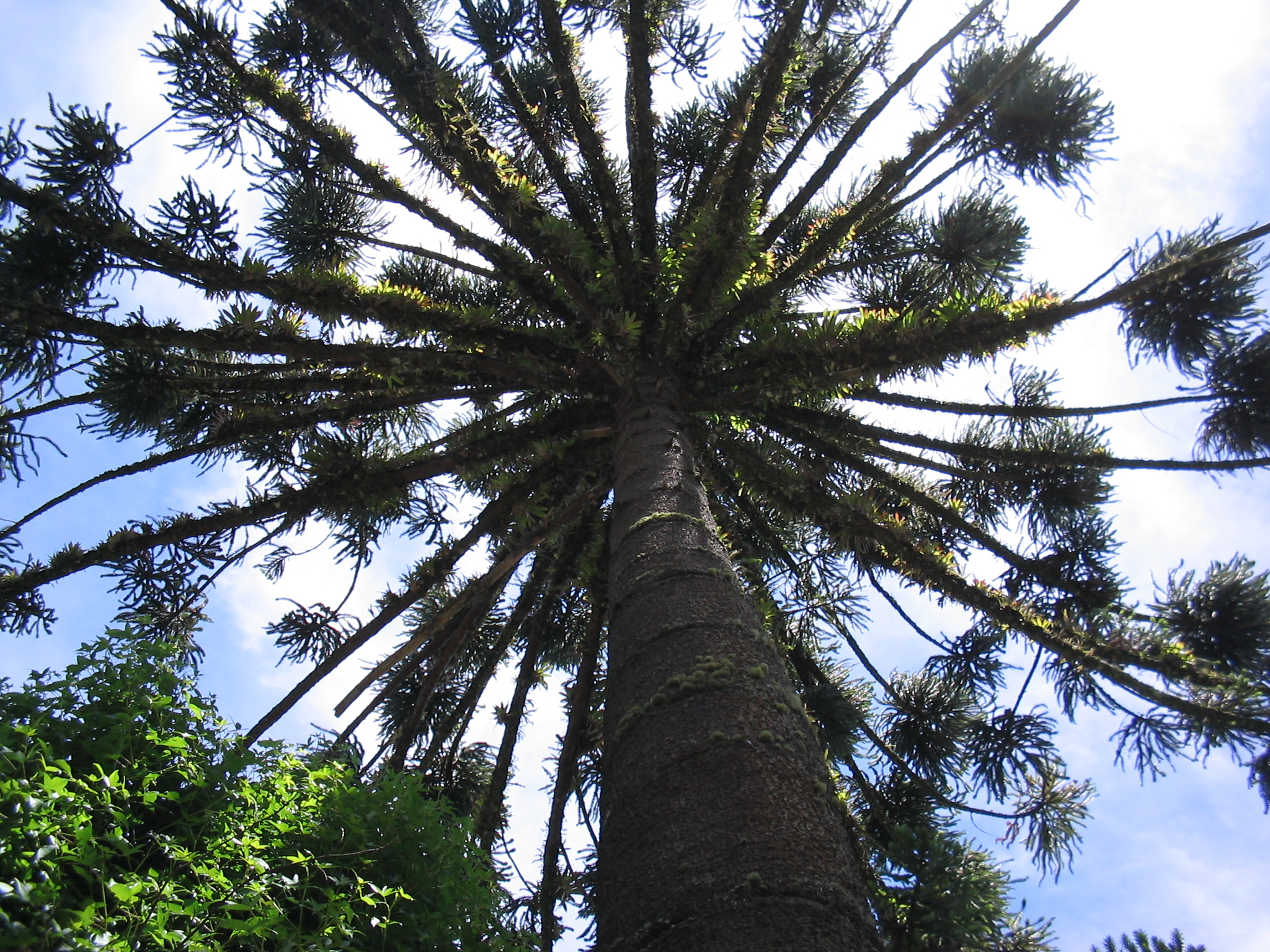 Araucaria angustifolia em Campos do Jordão-SP